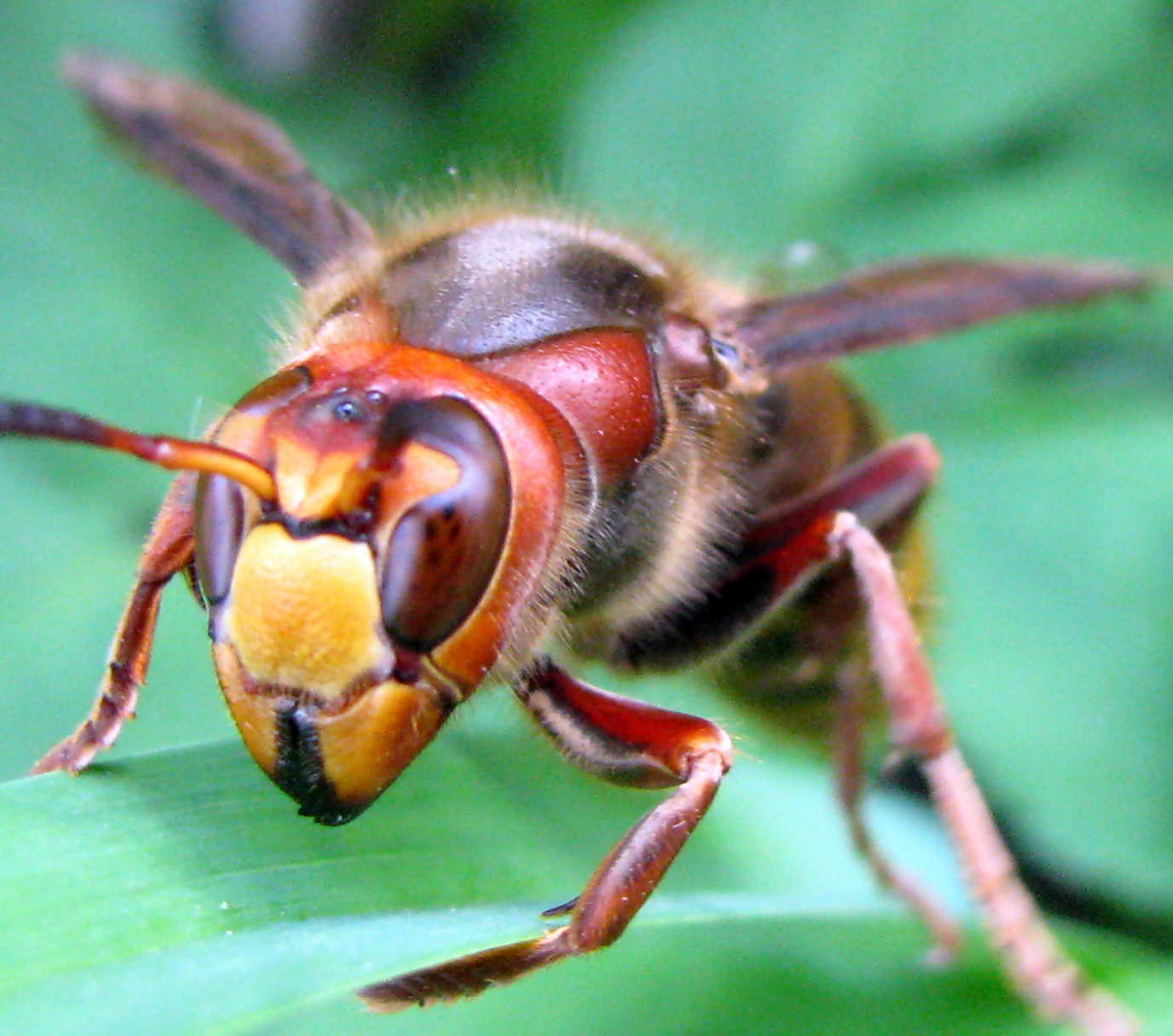 шершень, село Горбаків біля м.Гоща, Волинь